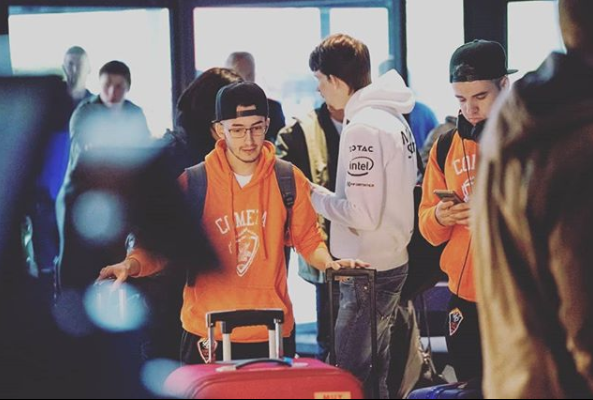 Cometa Team, Polaris Lan Pro Series 2018